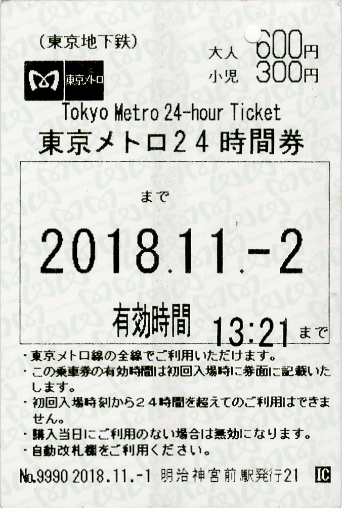 東京地下鉄（東京メトロ）発行の東京メトロ24時間券